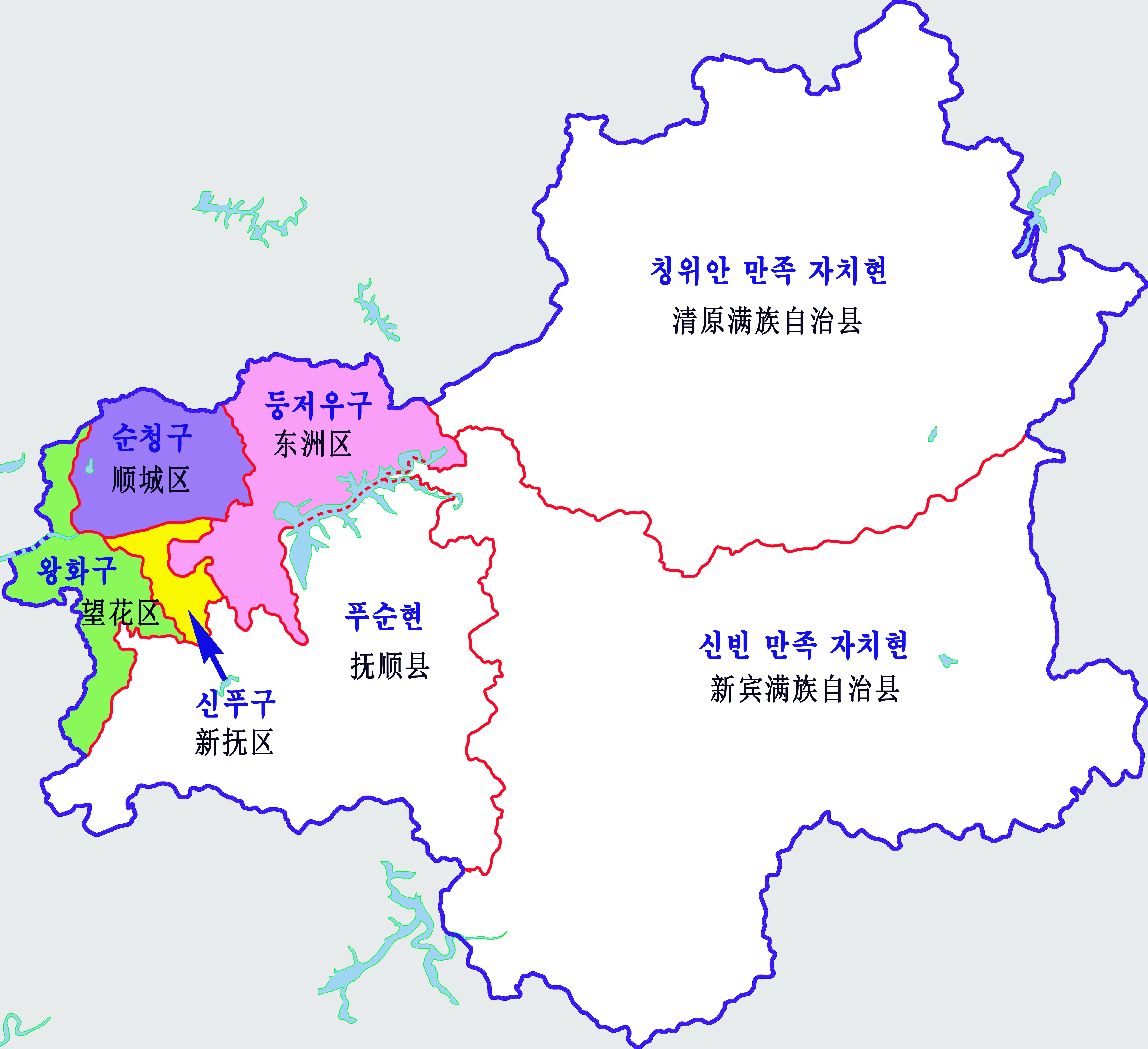 푸순시지도